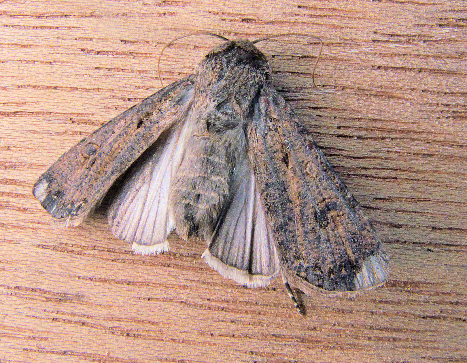 Agrotis ipsilon; Grote worteluil